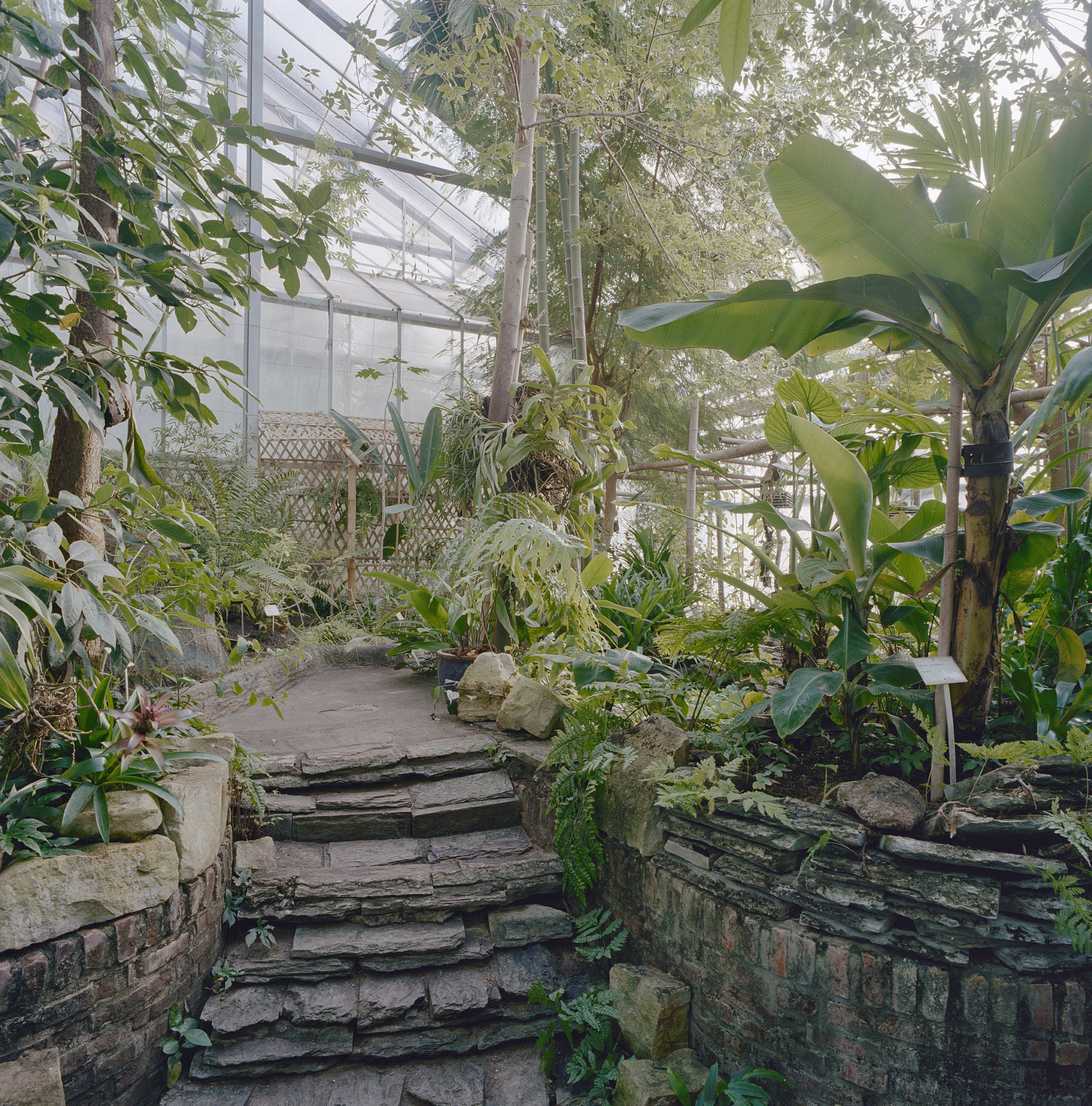 Hortus Haren - Hortus van de Rijksuniversiteit van Groningen: Interieur, sfeeropname van de tropische kas